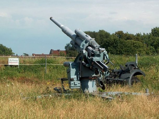 8,8-cm-Flak auf der Zitadellenbastion IV, Jülich